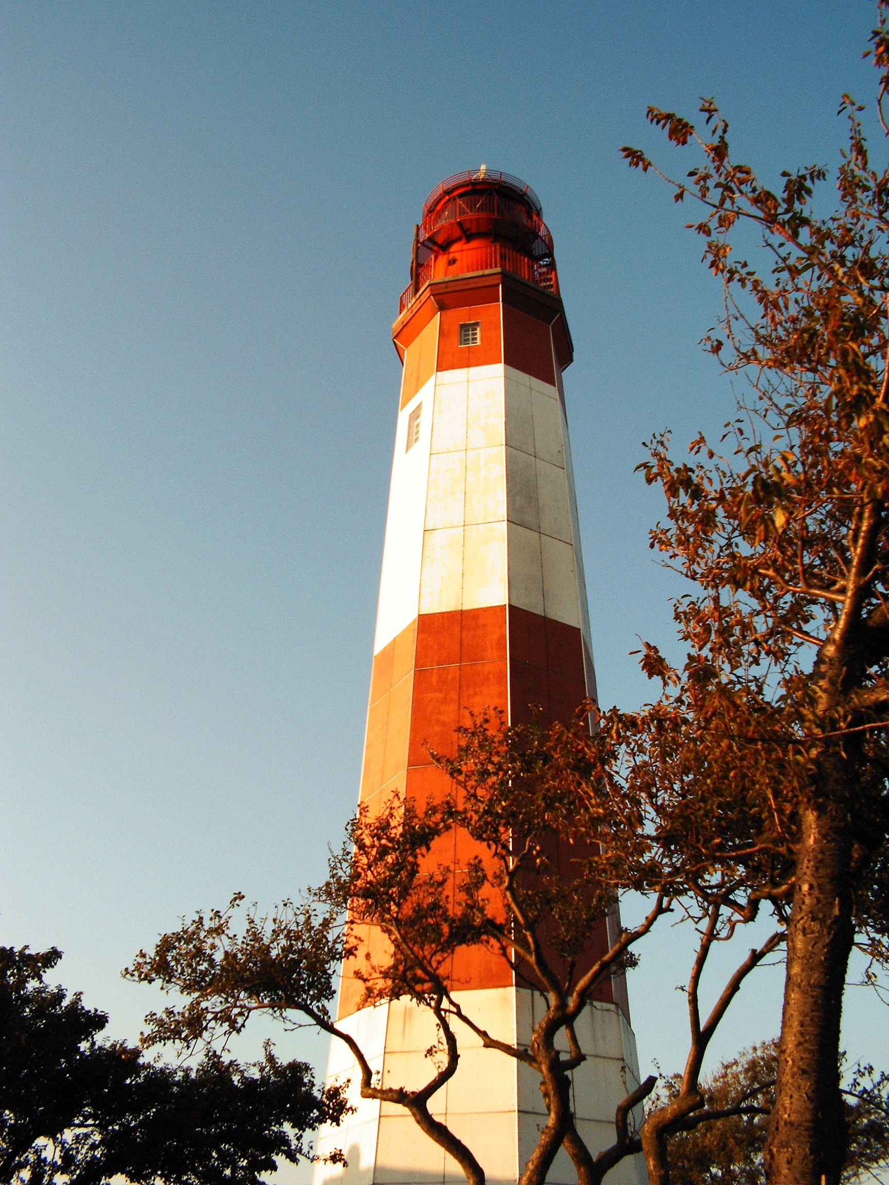 Flügger Leuchtturm auf Fehmarn